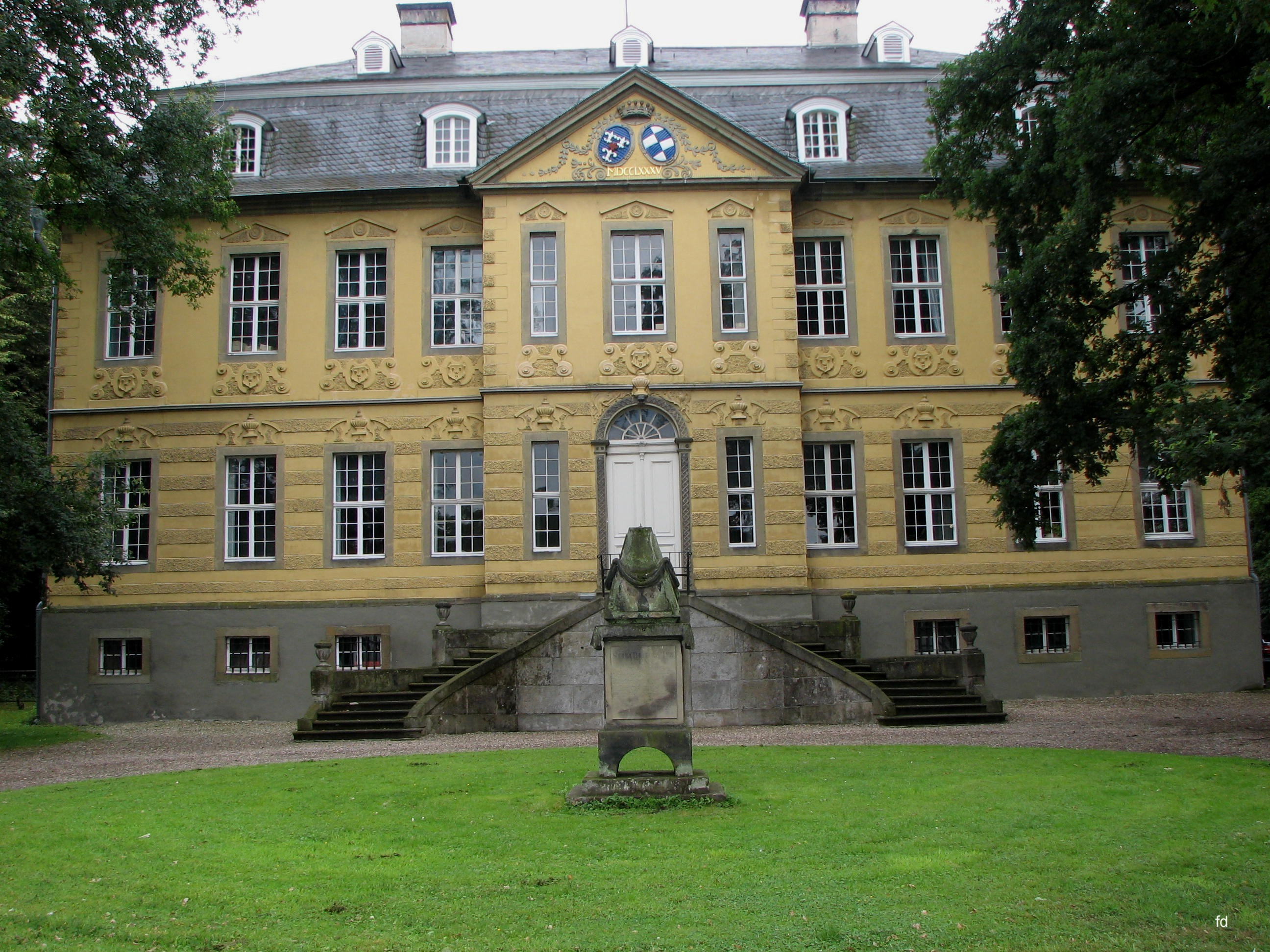 Schloß Haus SassendorfThis is a photograph of an architectural monument., no. Bad Sassendorf 20